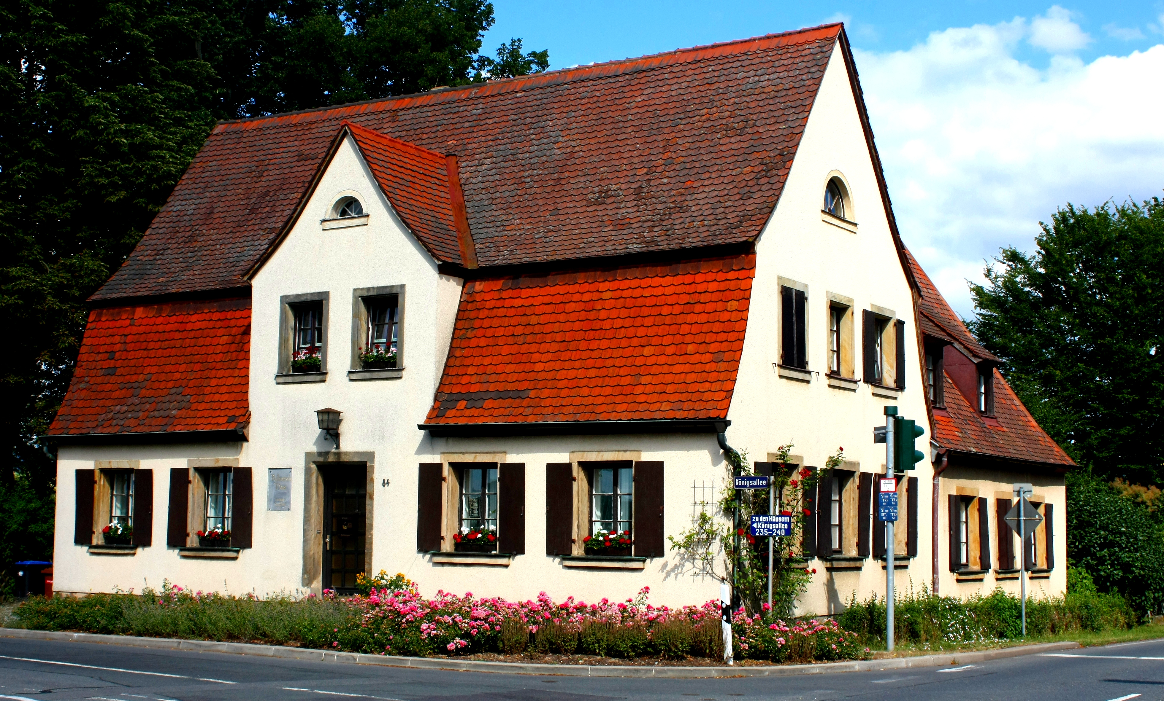 Rollwenzelei in Bayreuth (ehemals Gasthaus und Dichterstube von Jean Paul)